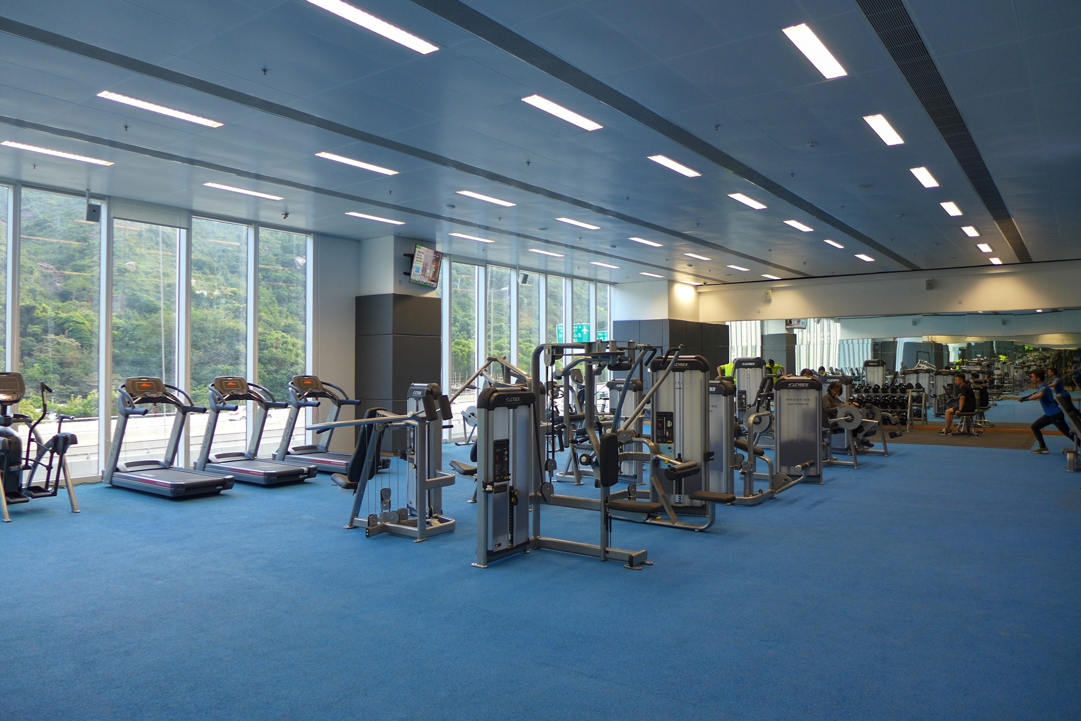 Yuen Chau Kok Sports Centre Fitness Room